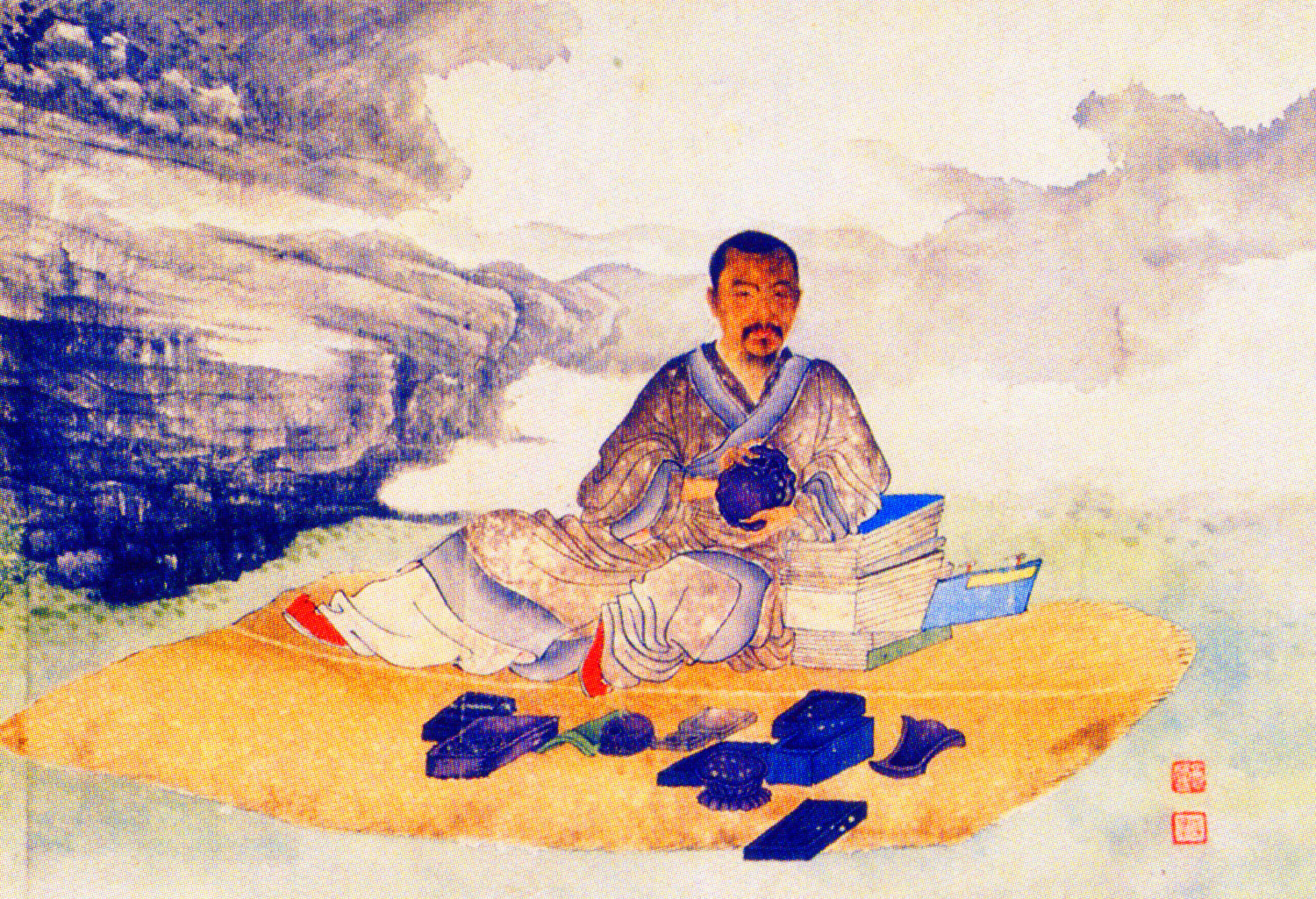 汪懋麟（1640年－1688年），字季角，號蛟門，江南江都縣人。清朝官員、詩人。